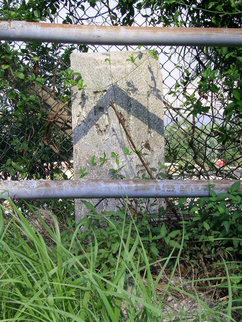 中文（香港）: 位於崇基學院附近的11-1/2咪石柱